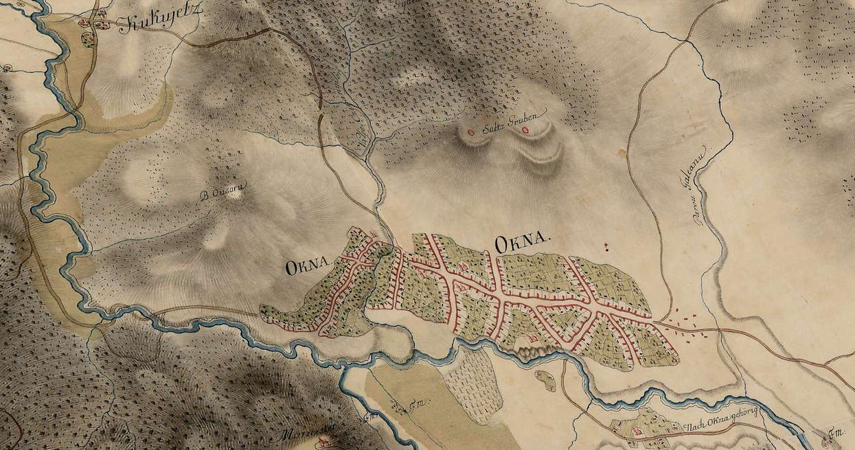 Târgu Ocna, Ridicarea topografică iozefină (1763-1787)